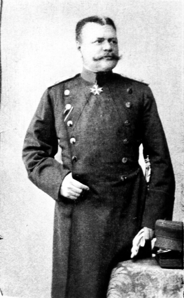 Generalmajor Hanno v. Dassel